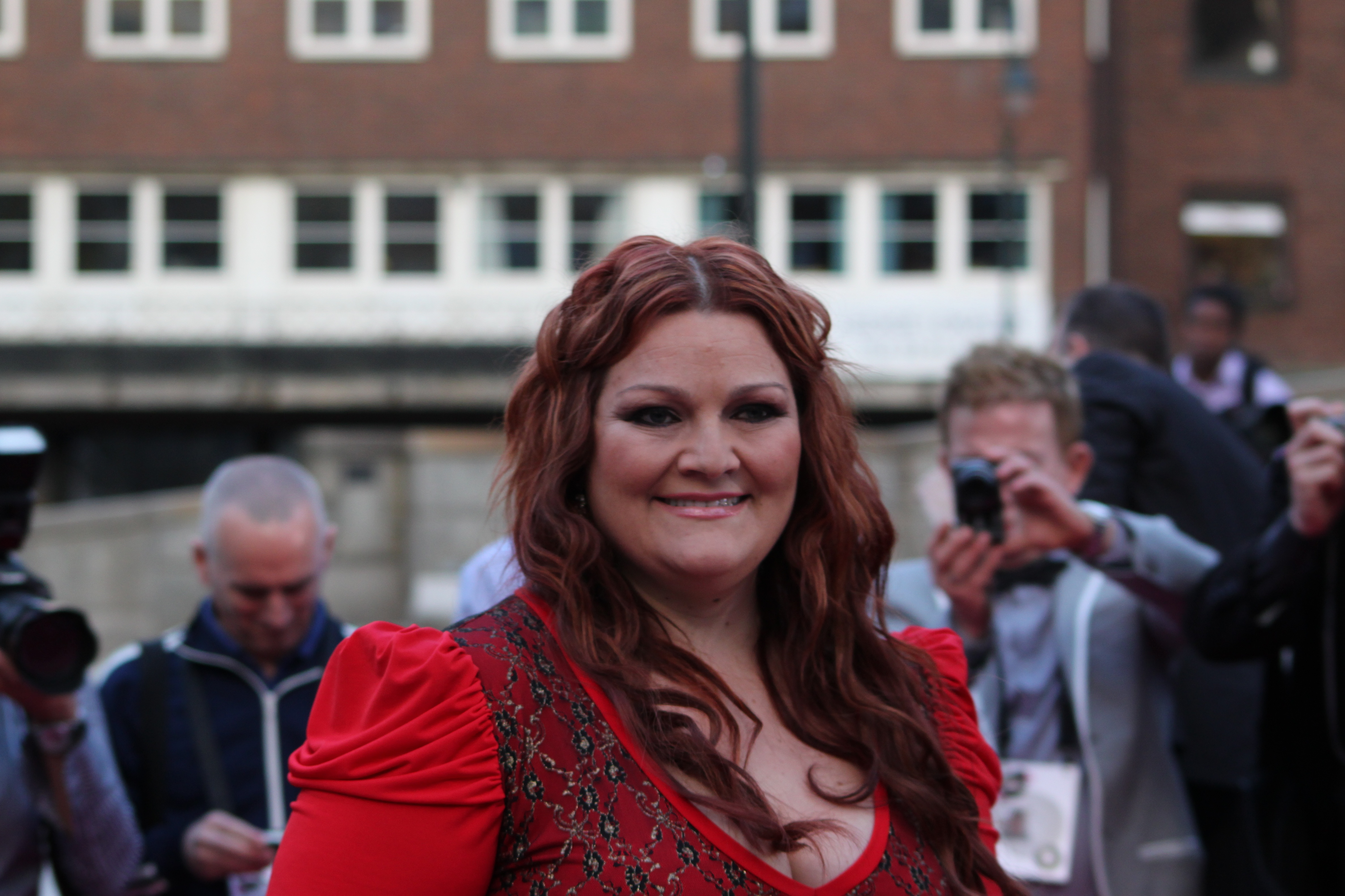 Foto: Vincent Hasselgård, Aktiv I Oslo.no